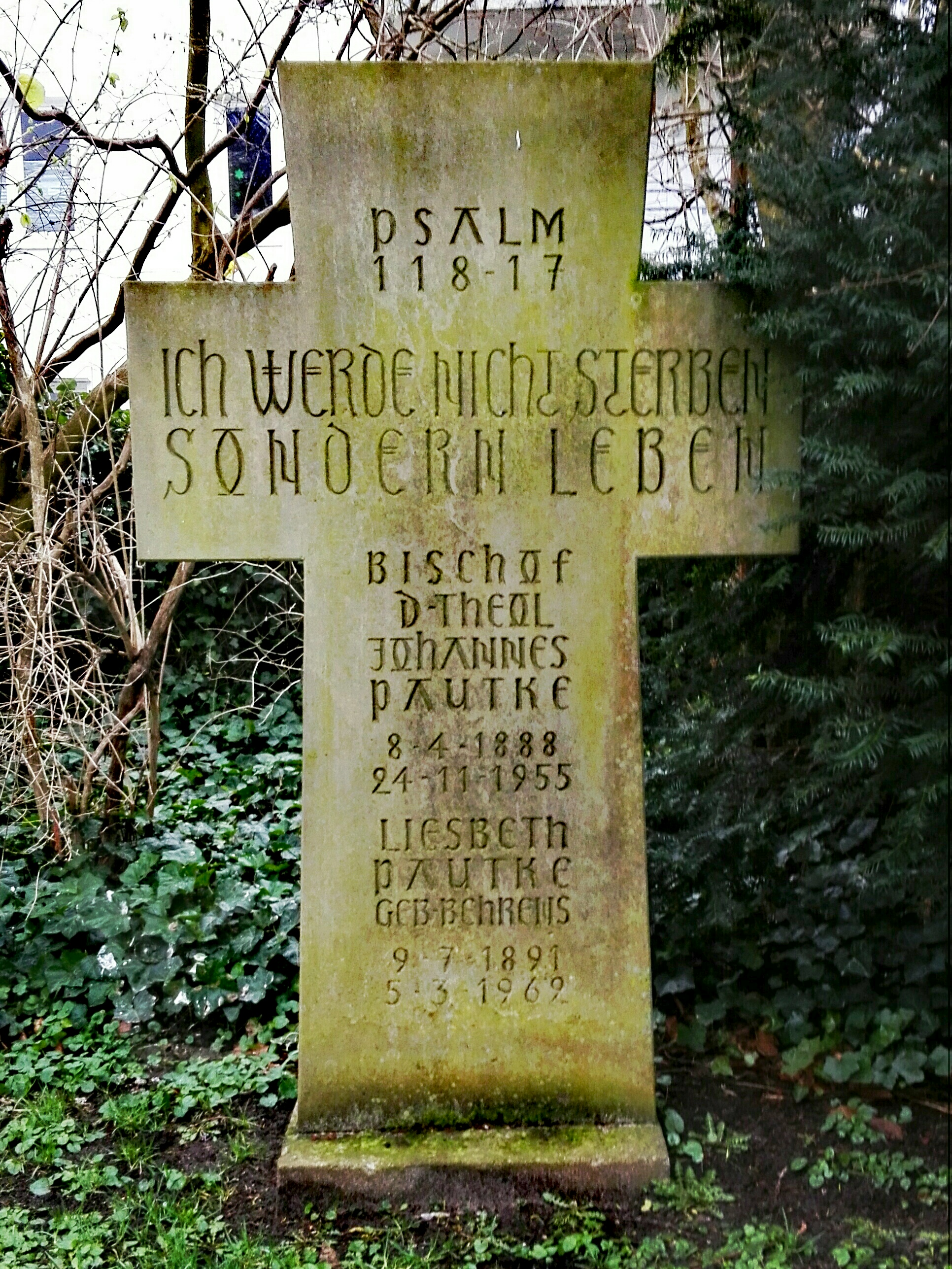 Grabstein von Johannes Pautke.